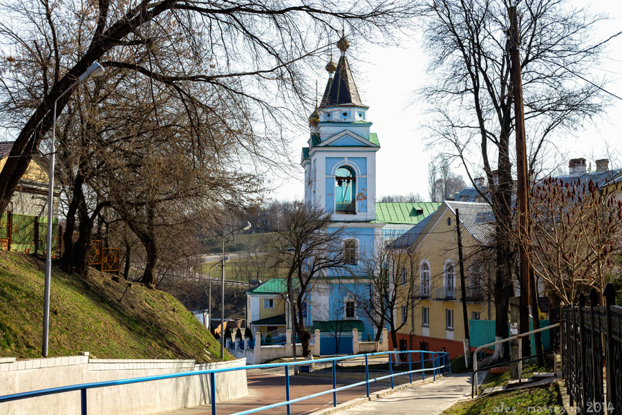 Мазыр. Спуск да сабора